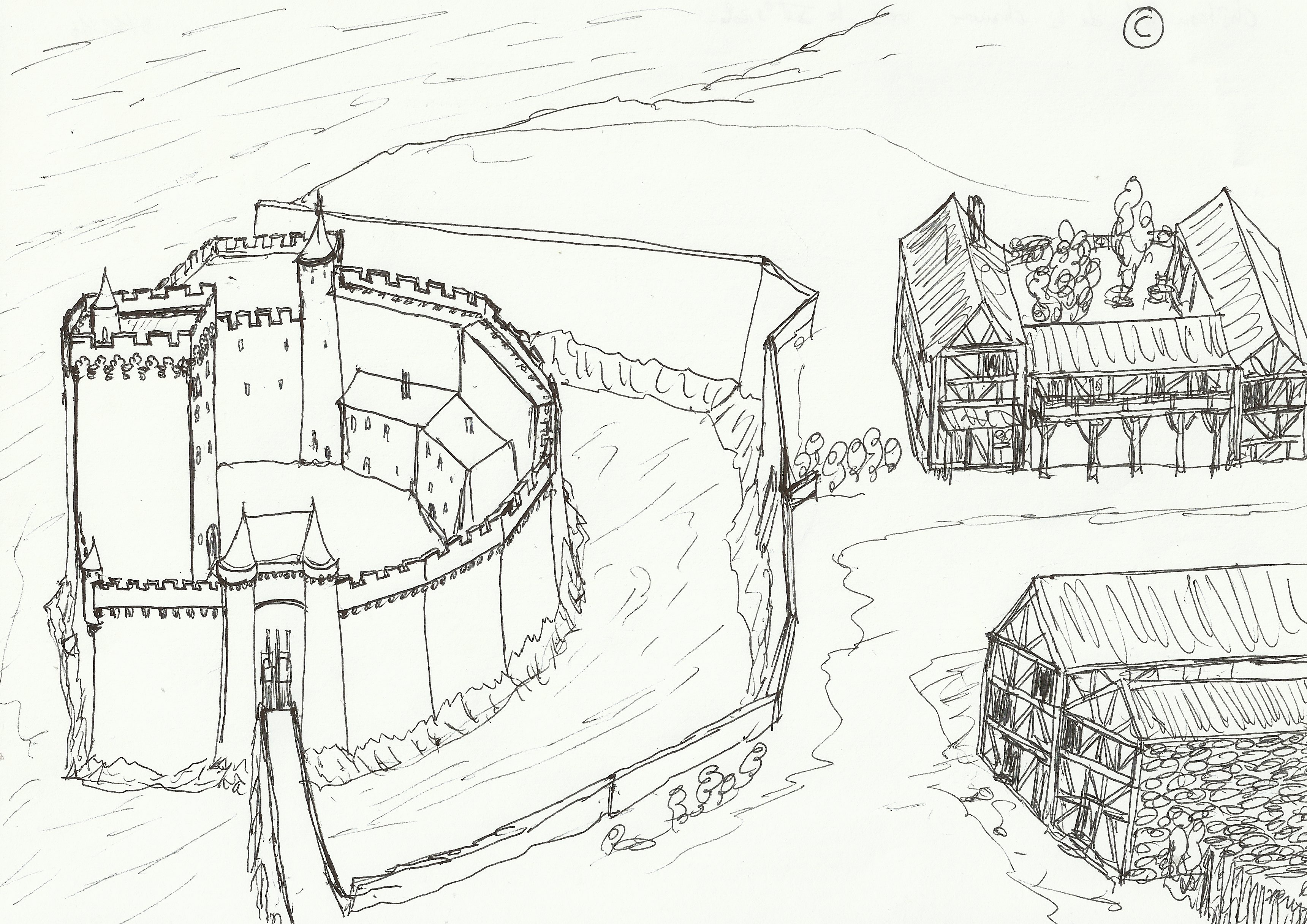 Croquis montrant une allure possible du château de la Chaume à l’époque médiévale.